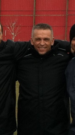 Sturing